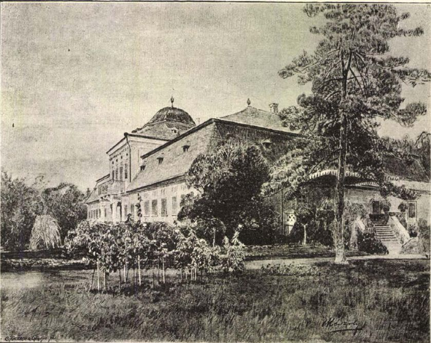 A geszti Tisza-kastély Mészöly Géza festményén